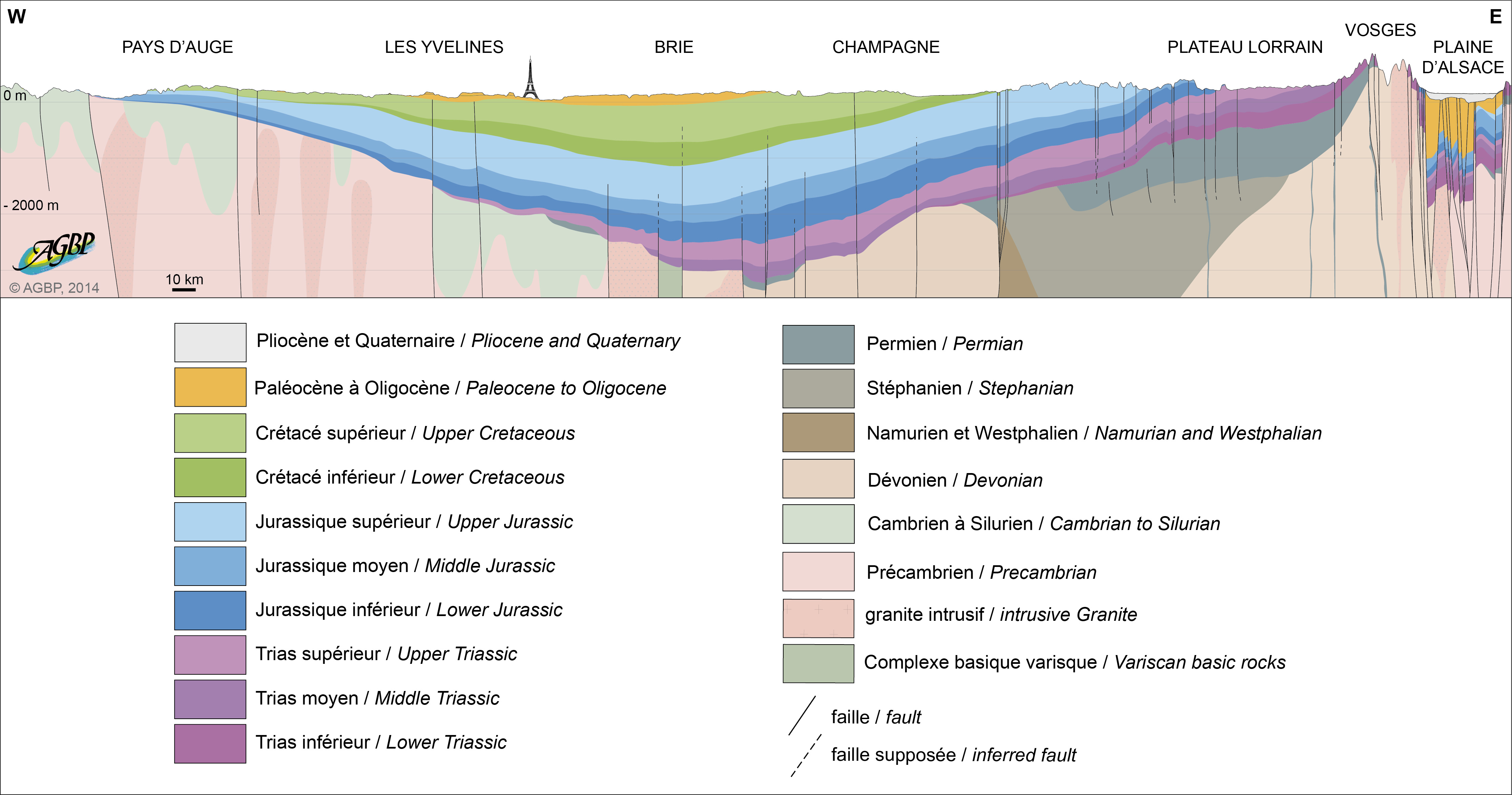 Extrait de la coupe géologique détaillée montrant la couverture sédimentaire du Bassin parisien (en violet, Trias ; en bleu, Jurassique, en vert, Crétacé, en orange : Tertiaire) de l’Ile-de-France, recouvrant le bassin sarro-lorrain permien et carbonifère (en gris et en brun) : profondeur de la coupe : 3000 m. © AGBP